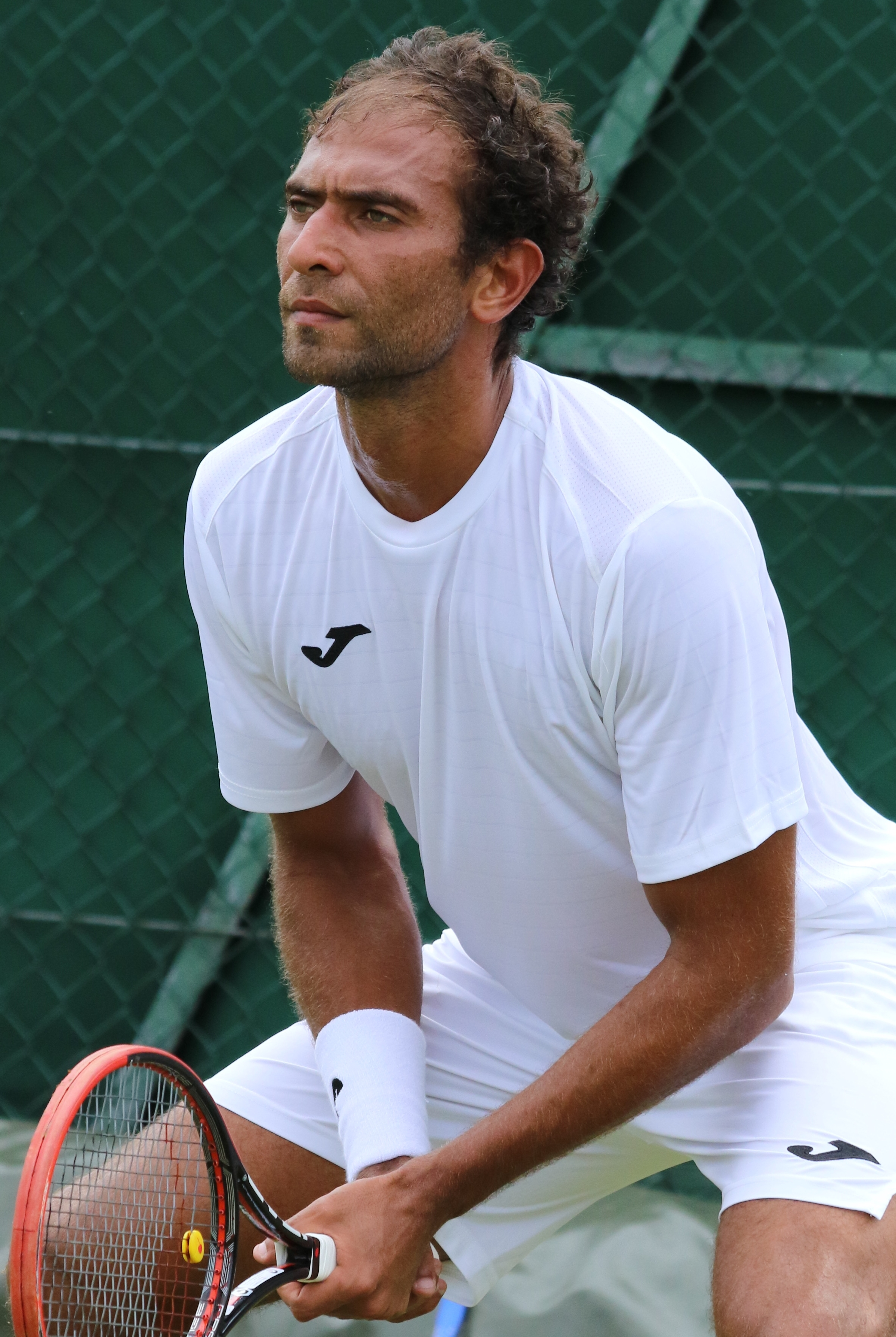 Safwat WMQ16 (2)